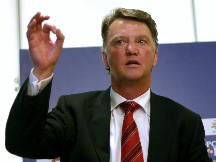 Louis van Gaal boos